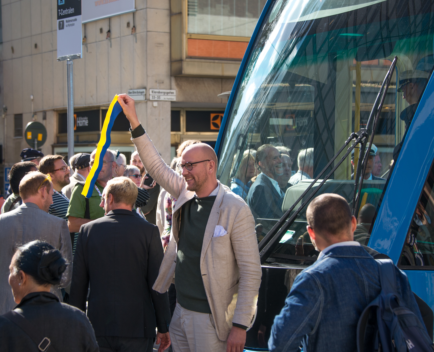 Gustav Hemming vid invigningen av Spårväg Citys nya hållplats vid Klarabergsgatan och därmed förlängning av linjen fram till T-centralen. Den nya hållplatsen T-Centralen blir ny start- och sluthållplats för Spårväg City mot Djurgården.